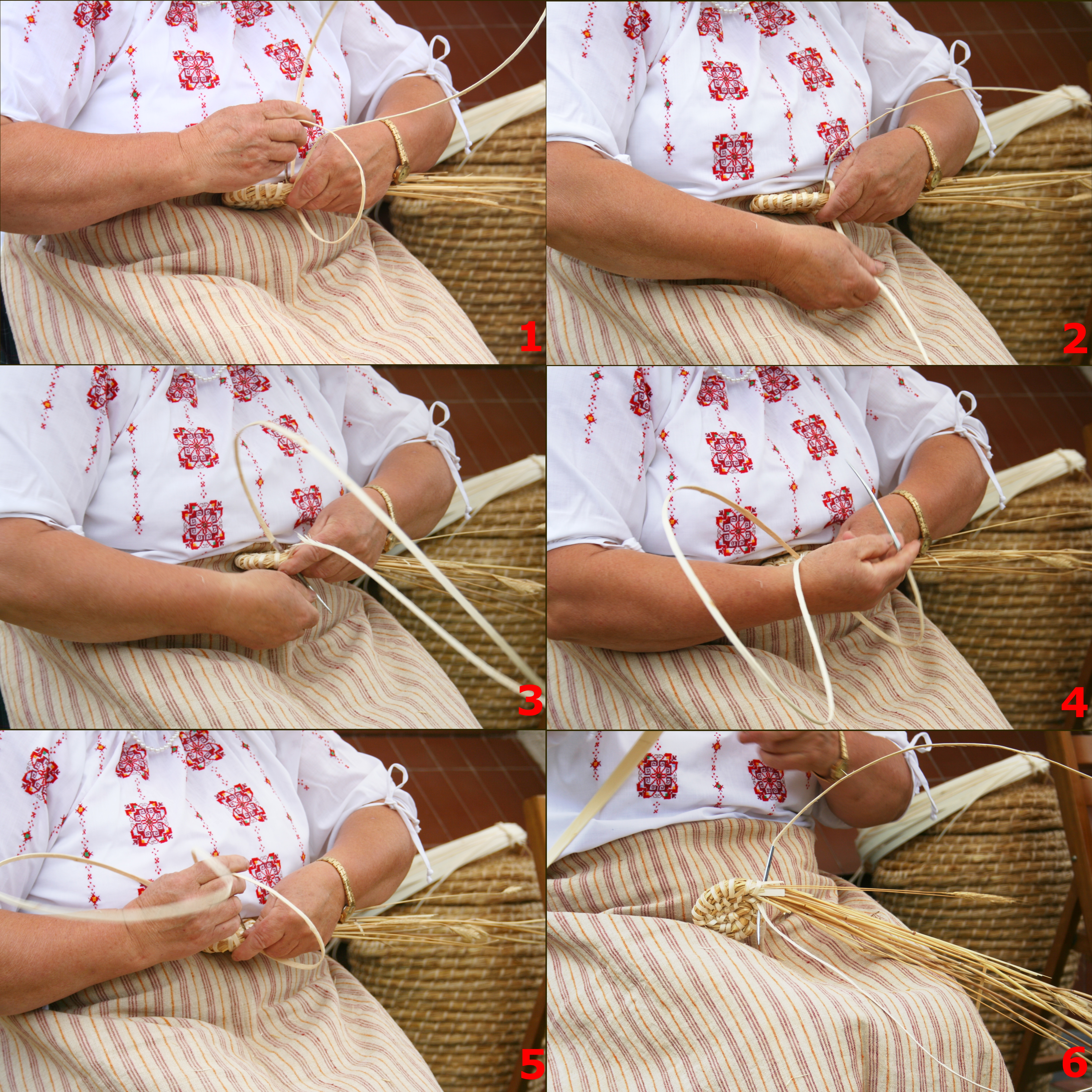 Wyplatanie kosza podczas białoruskiego festynu etnograficznego "Słonko w Słomce" w Hajnówce